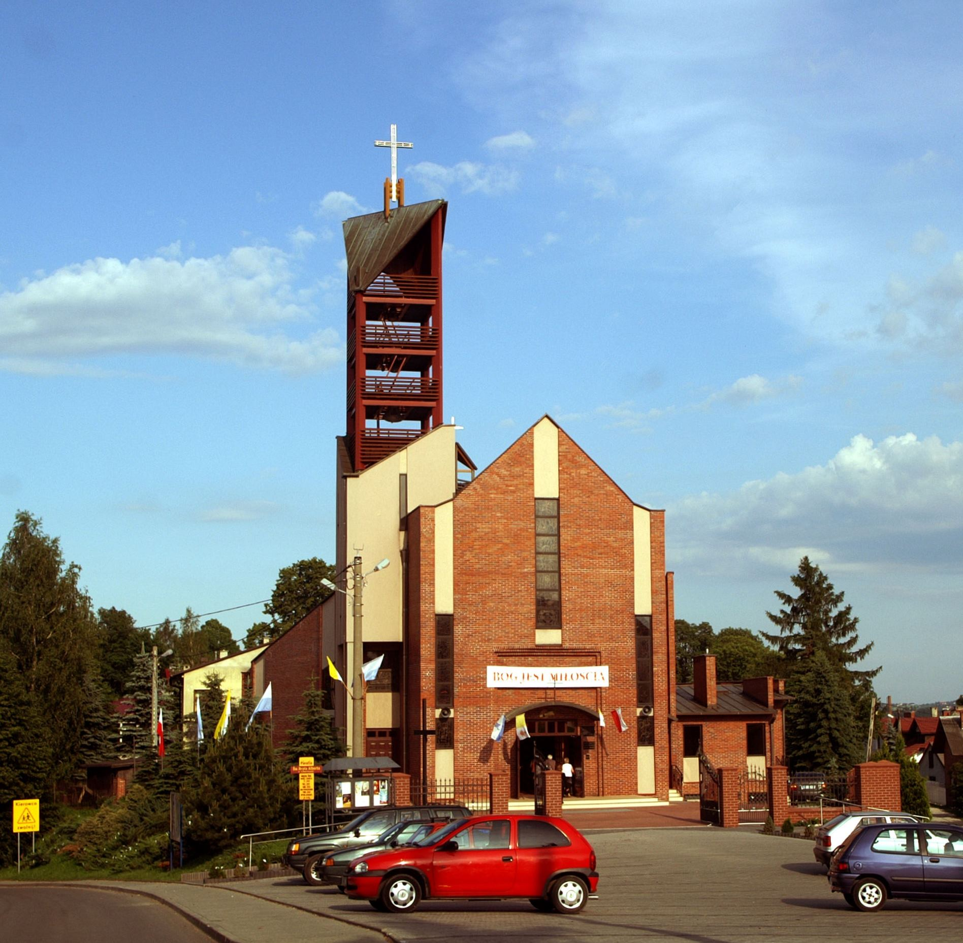 Pościół p.w. Brata Alberta w Libertowie